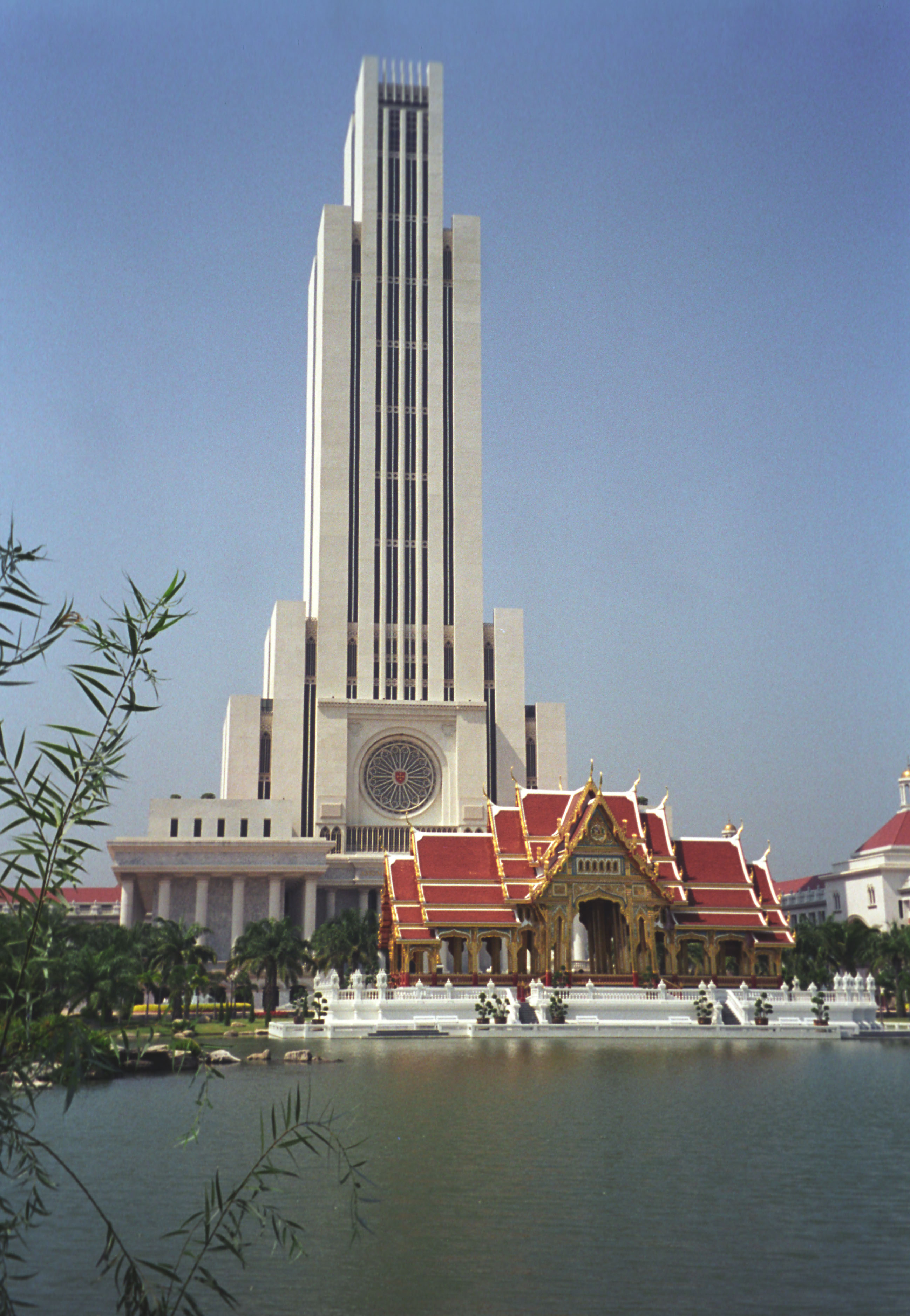 ABAC Assumption University Turm und Pavillon Bangkok Thailand